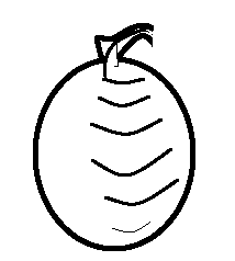 Ocurre un enrollamiento del tubo dentro de la vesicula